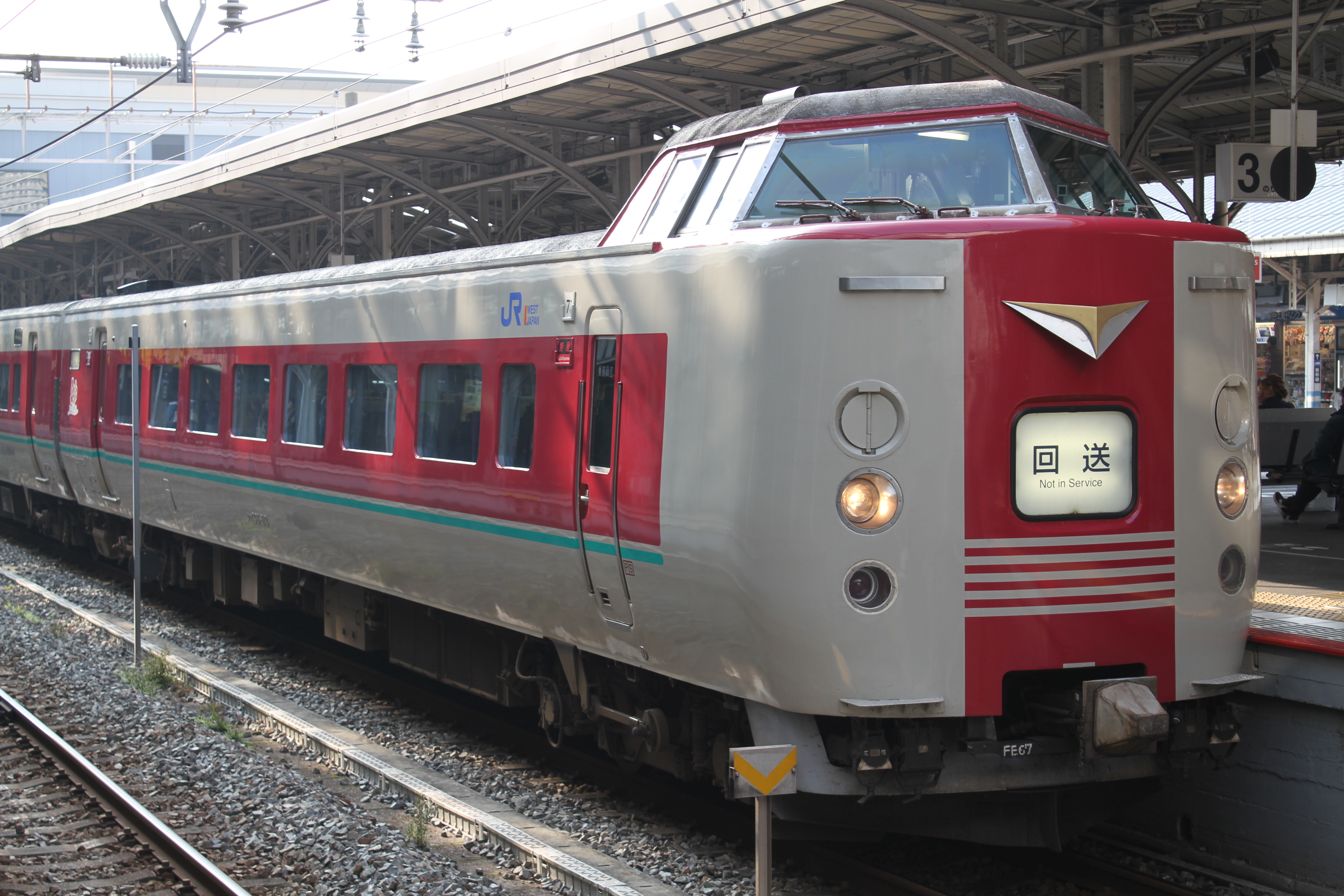 クハ381-113 ゆったりやくも改造車